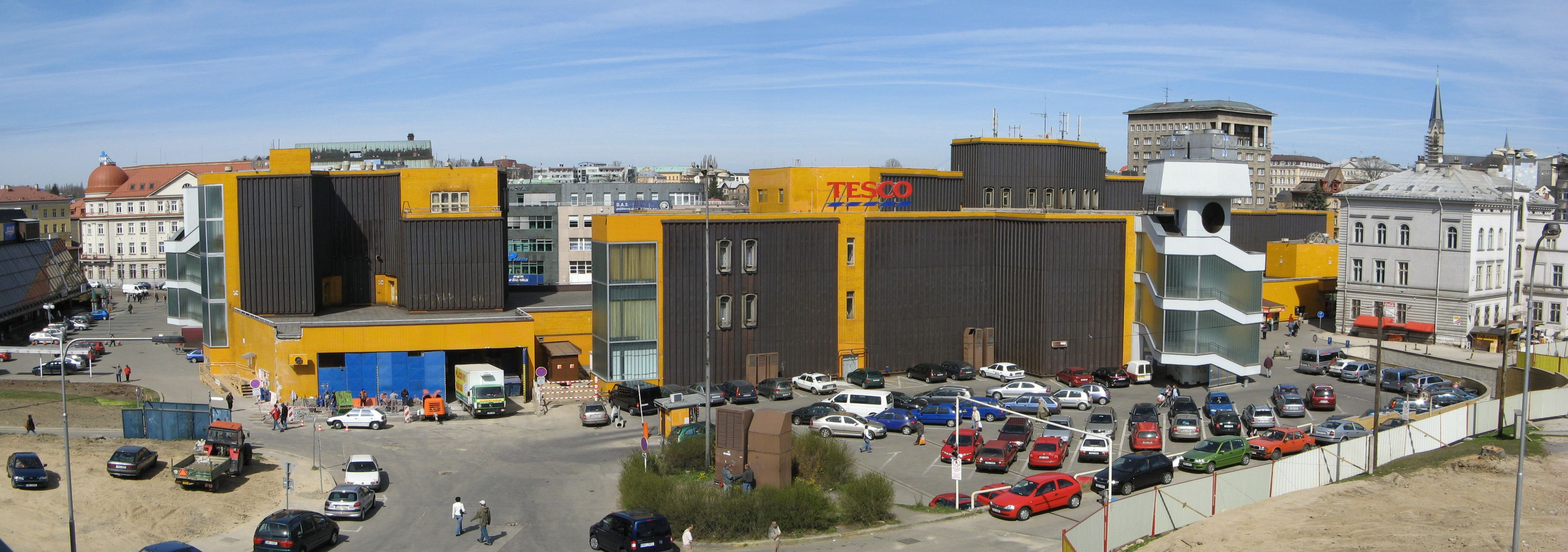 Department store Ještěd (now Tesco) in Liberec, CZ - Obchodní dům Ještěd, nyní Tesco v Liberci, pohled zezadu